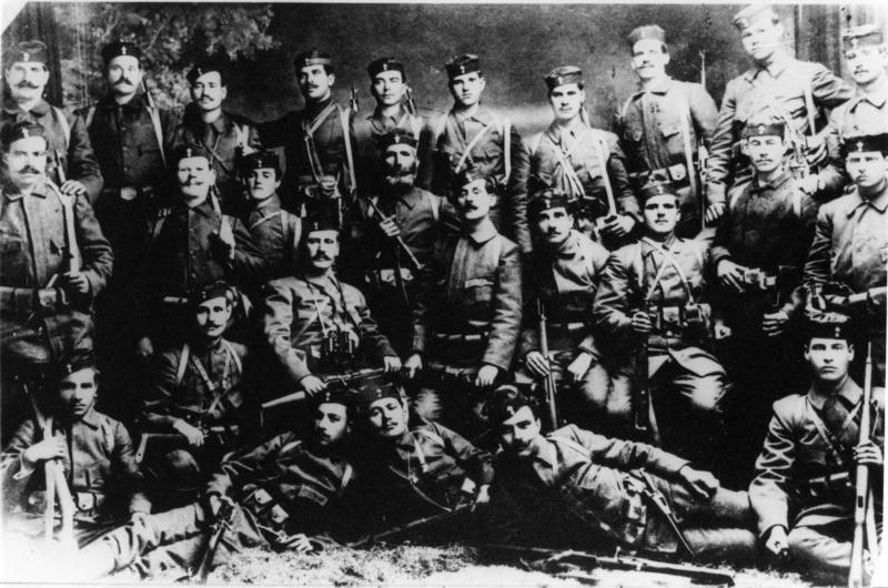 Четата на Атанасиос Минопулос.